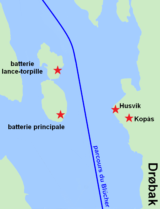 Les quatre batteries de la forteresse d'Oscarsborg ainsi que le parcours du croiseur lourd Blücher